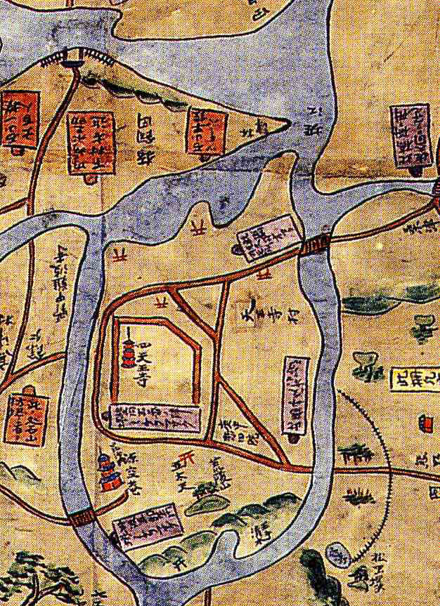 石山合戦配陣図の四天王寺部分拡大図